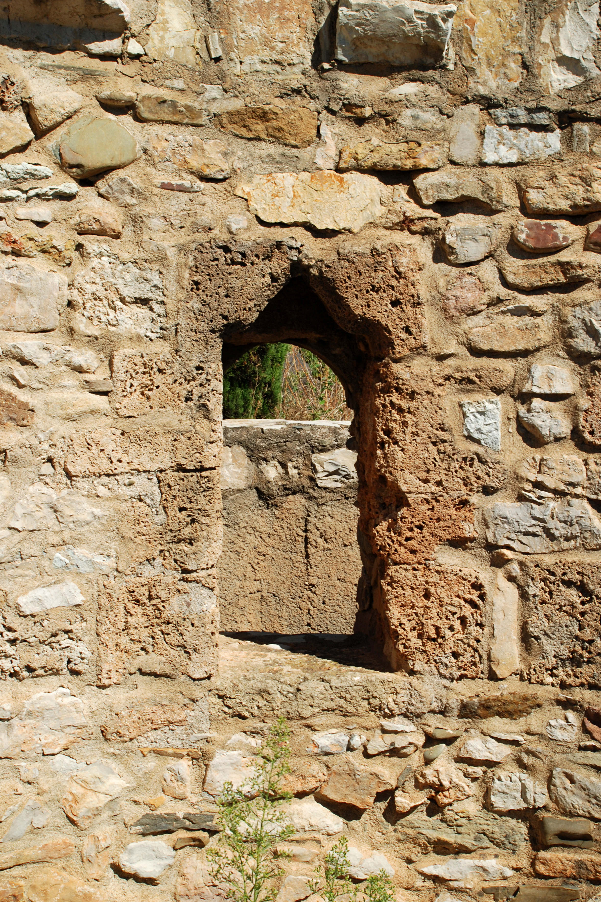 France - Languedoc - Hérault - Cessenon-sur-Orb - Chapelle Sainte-Anne